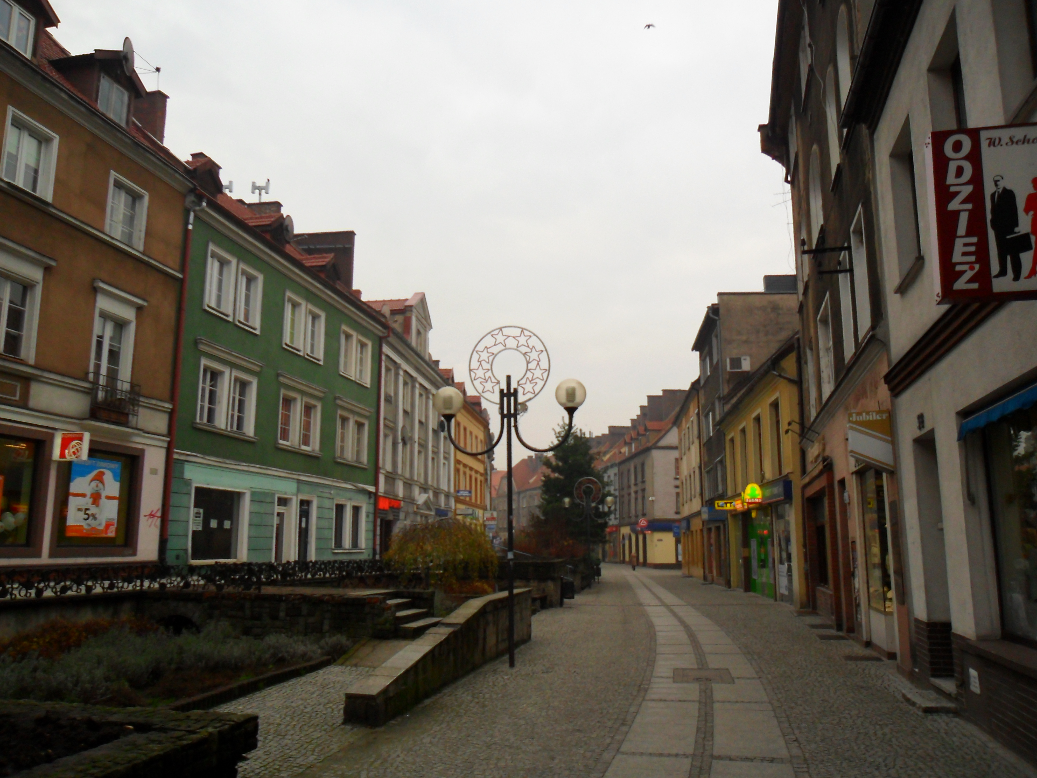 Ulica Długa w Raciborzu.